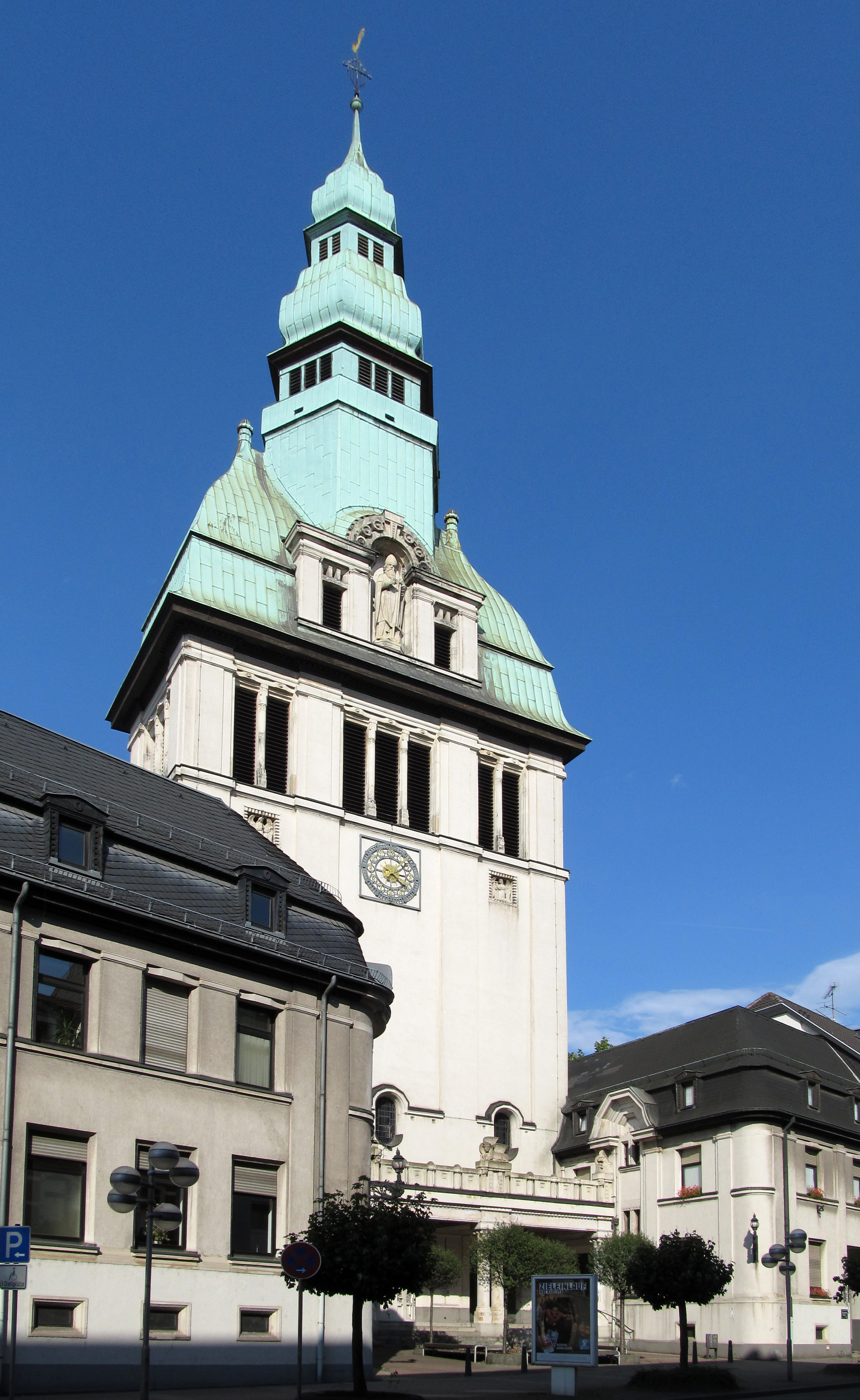 Turm der katholischen Pfarrkirche St. Eligius in Völklingen, Saarland